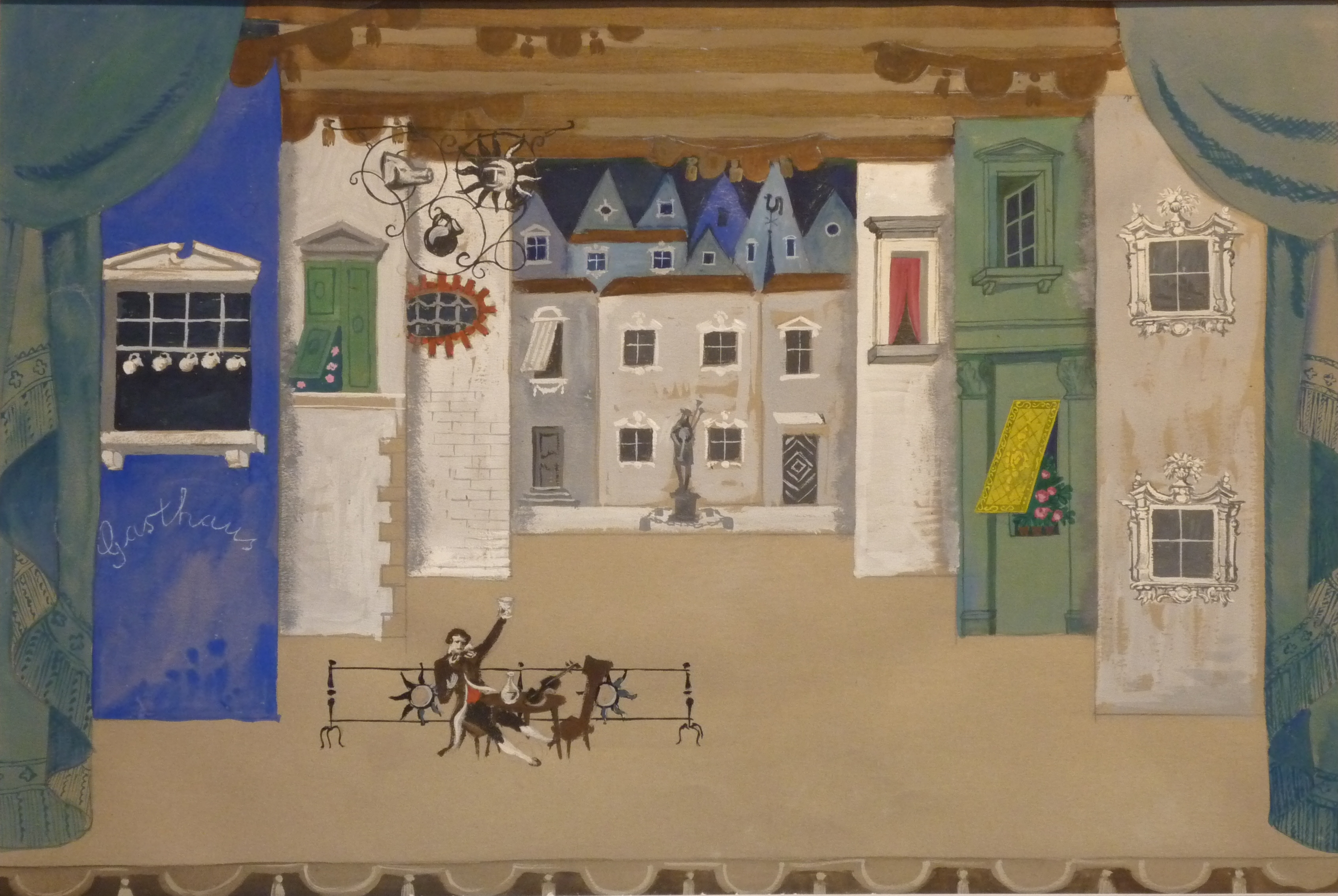 Bühnenbildentwurf von Helmut Jürgens für "Die Zaubergeige" von W. Egk, Aufführung München 1954